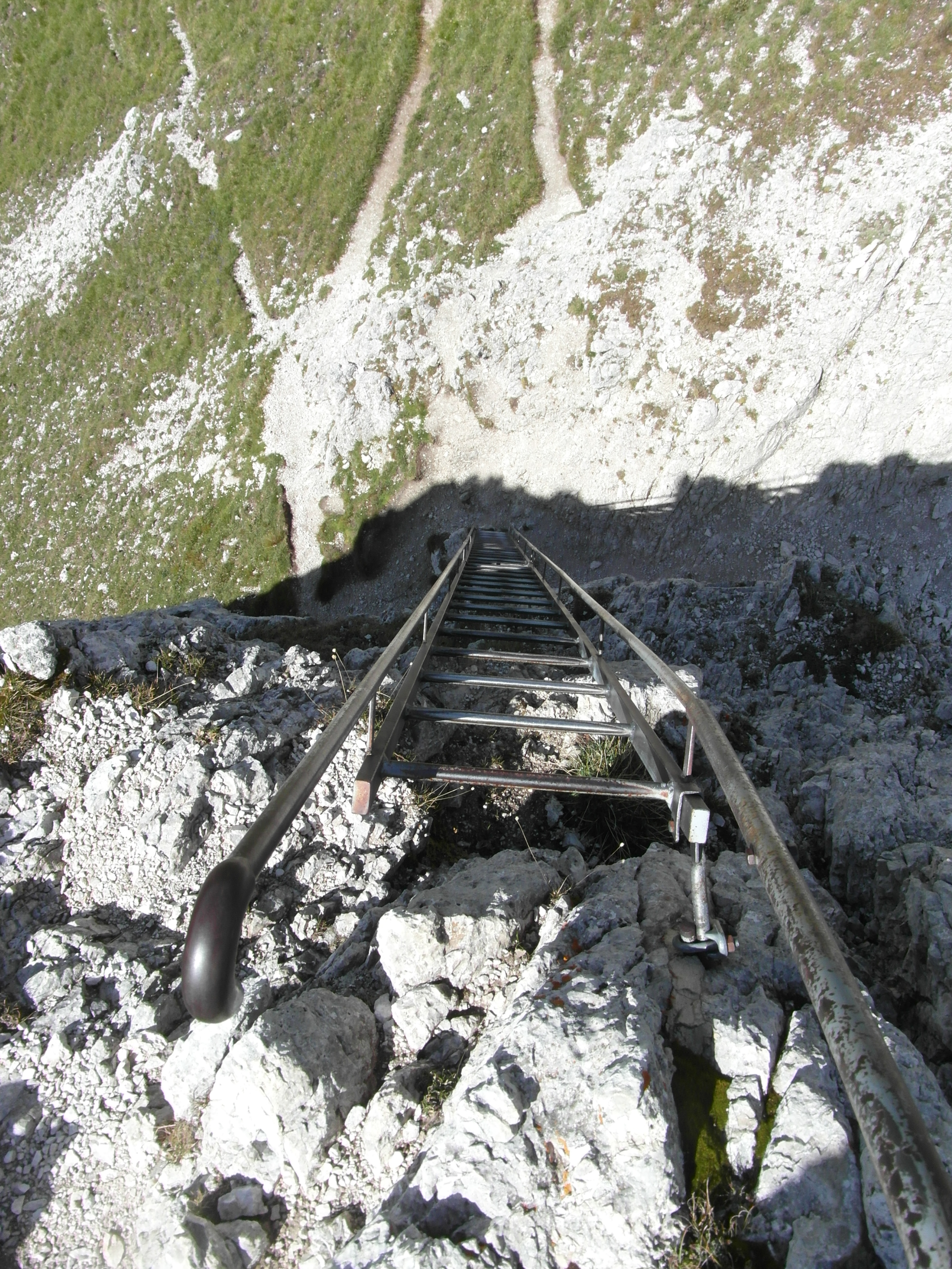 Sentiero attrezzato Günther Messner